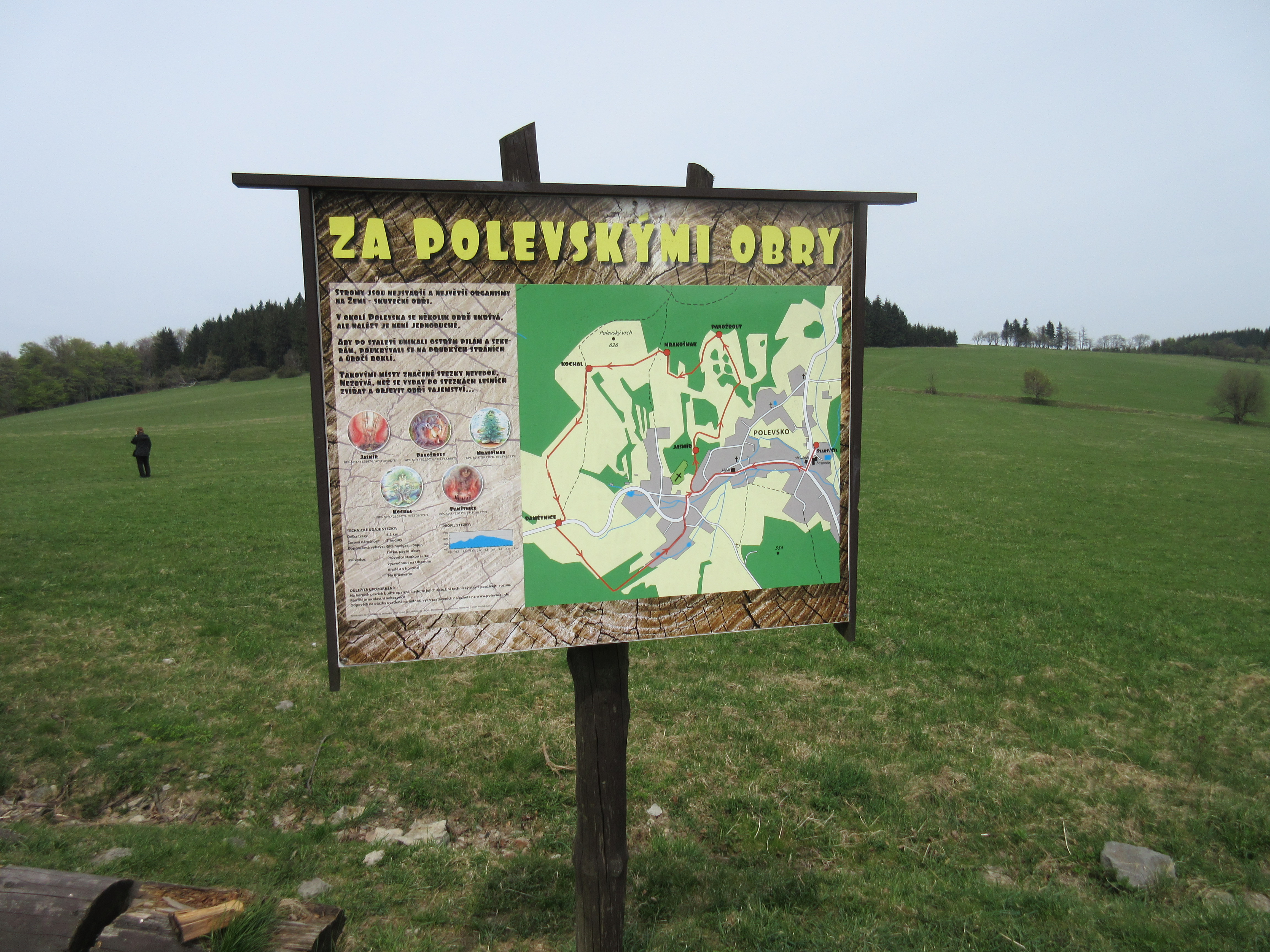 Tabule nové naučné stezky kolem obce Polevsko na Českolipsku